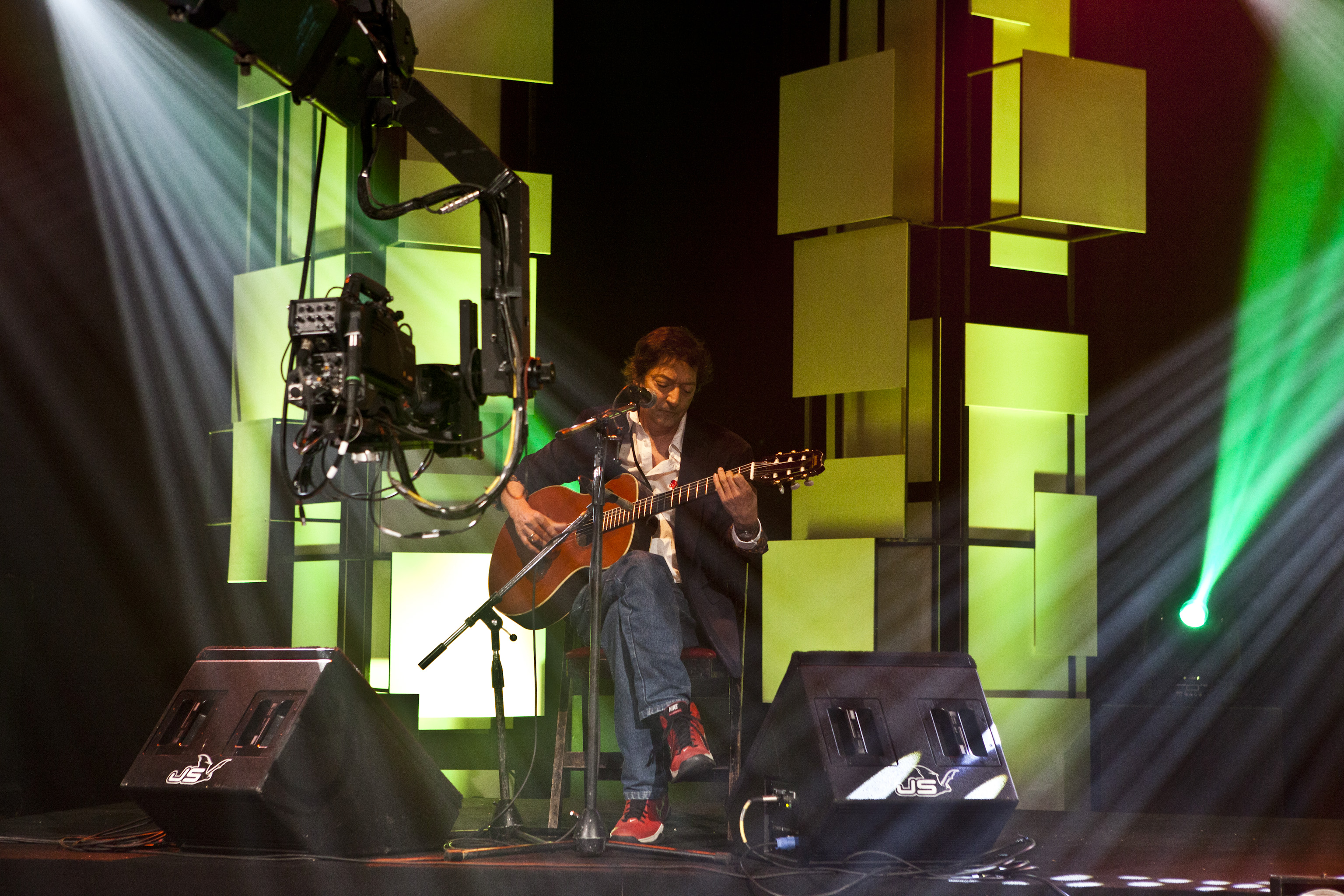 El músico y compositor, Julio Moura en el año 2014.